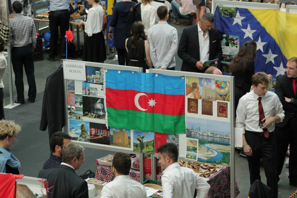 IPS - Stipendiatenabend